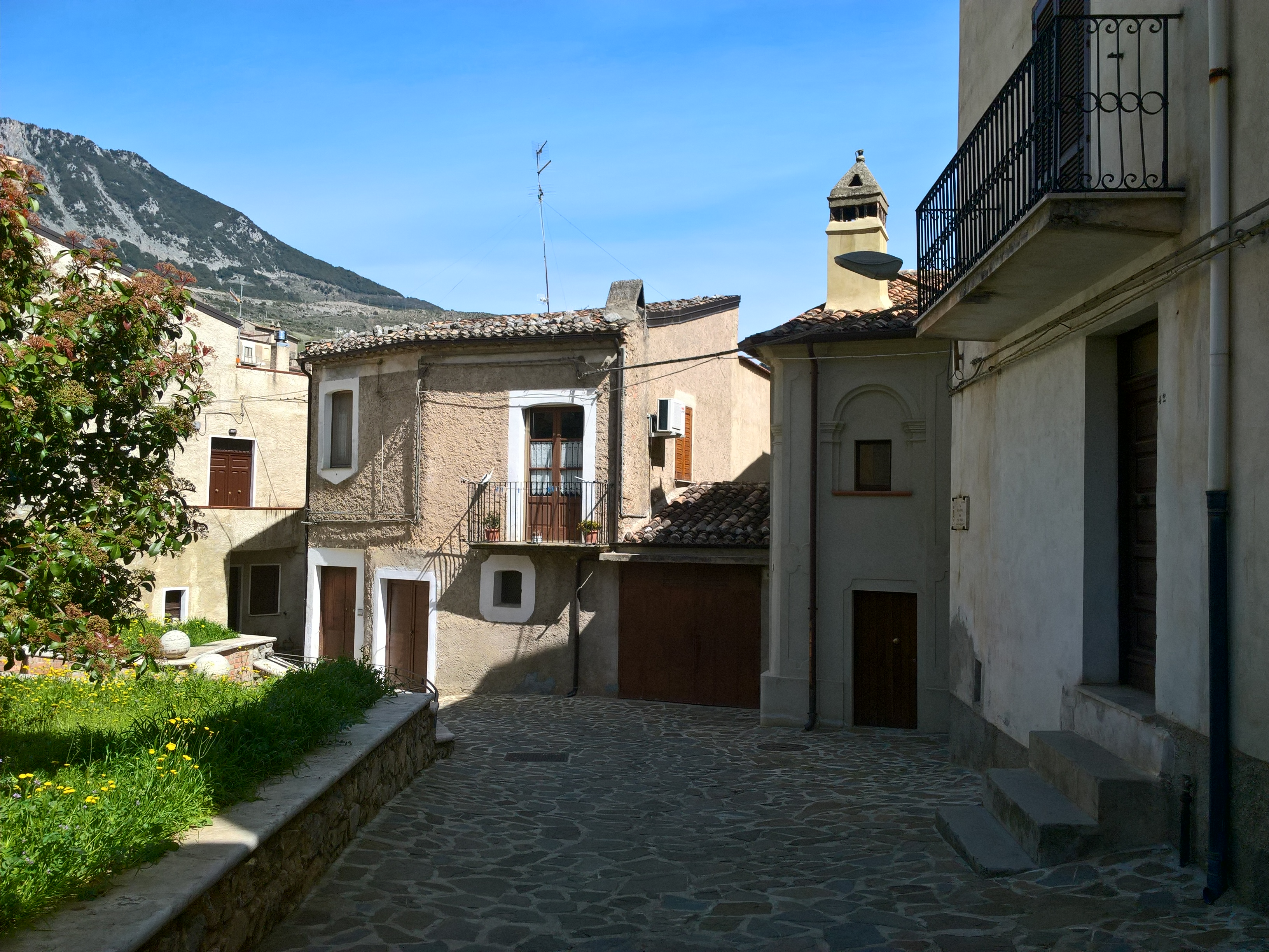 Typischer Arbëresh-Schornstein von Civita